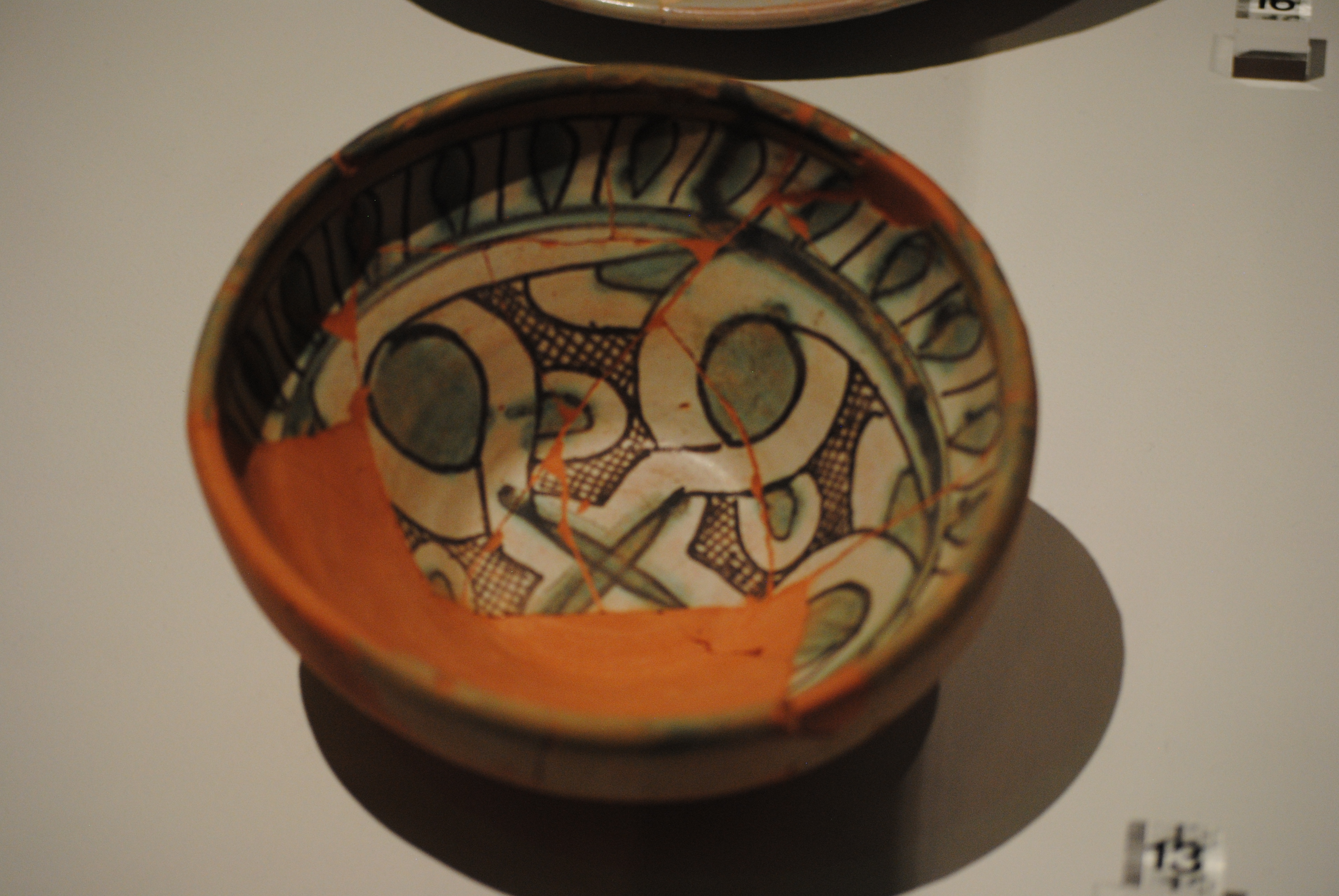 Ciotola in maiolica arcaica prodotta a Pisa nel XV secolo (recuperata in Piazza Duomo, Pisa) - Museo nazionale di San Matteo.